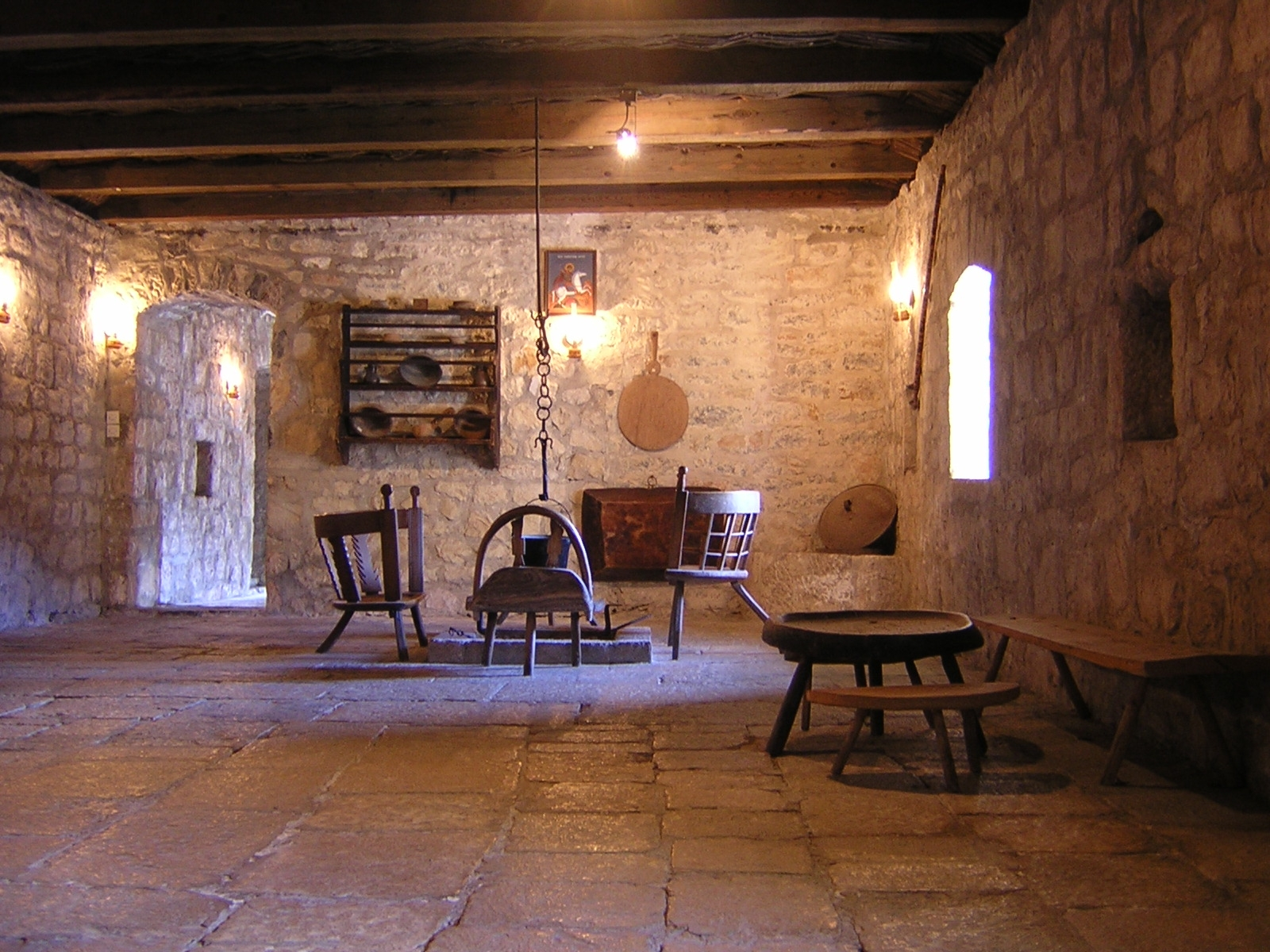 Njeguši